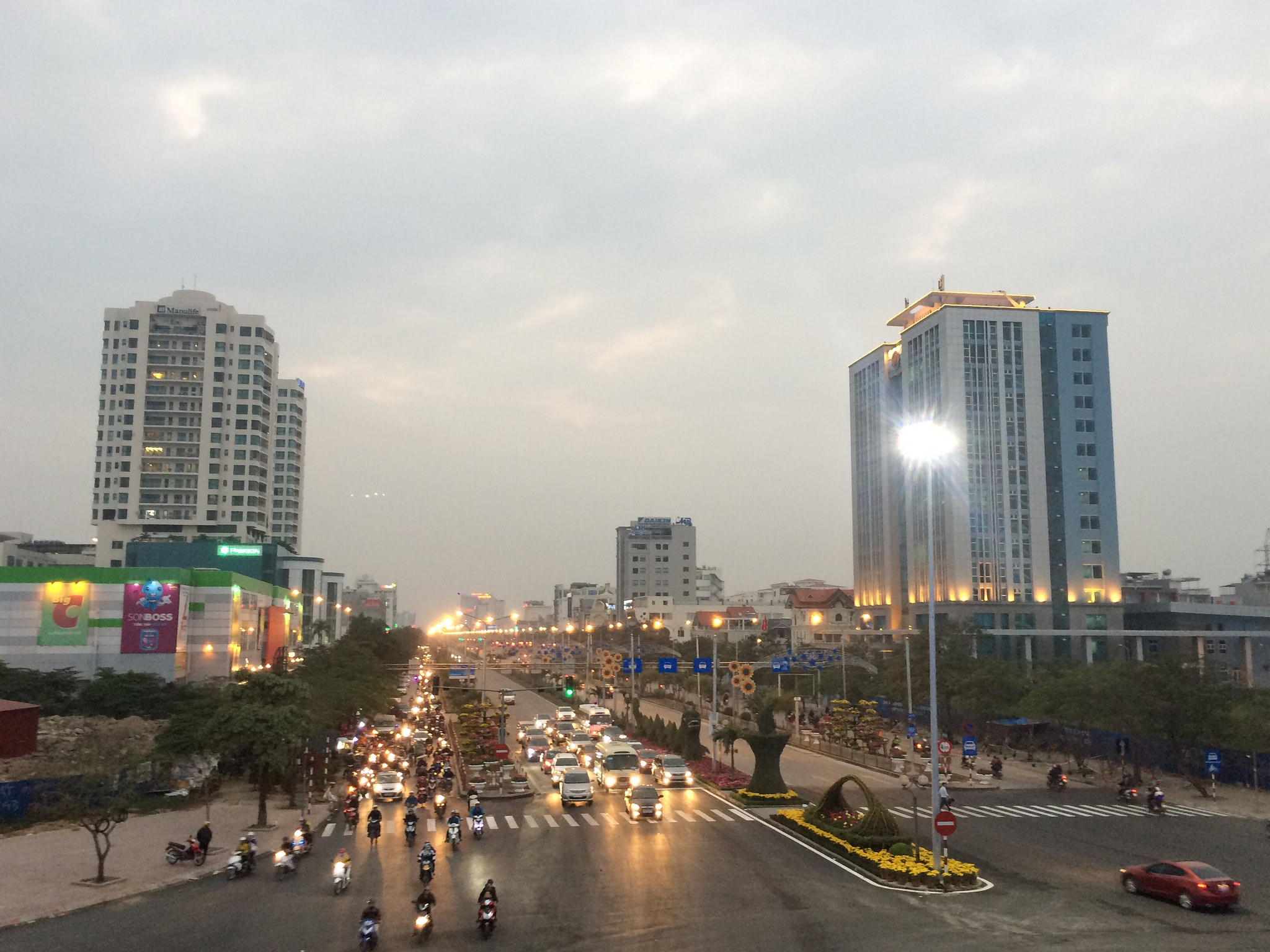 Đường phố Hải Phòng chụp từ cầu NBK